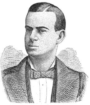 James Mason als junger Mann